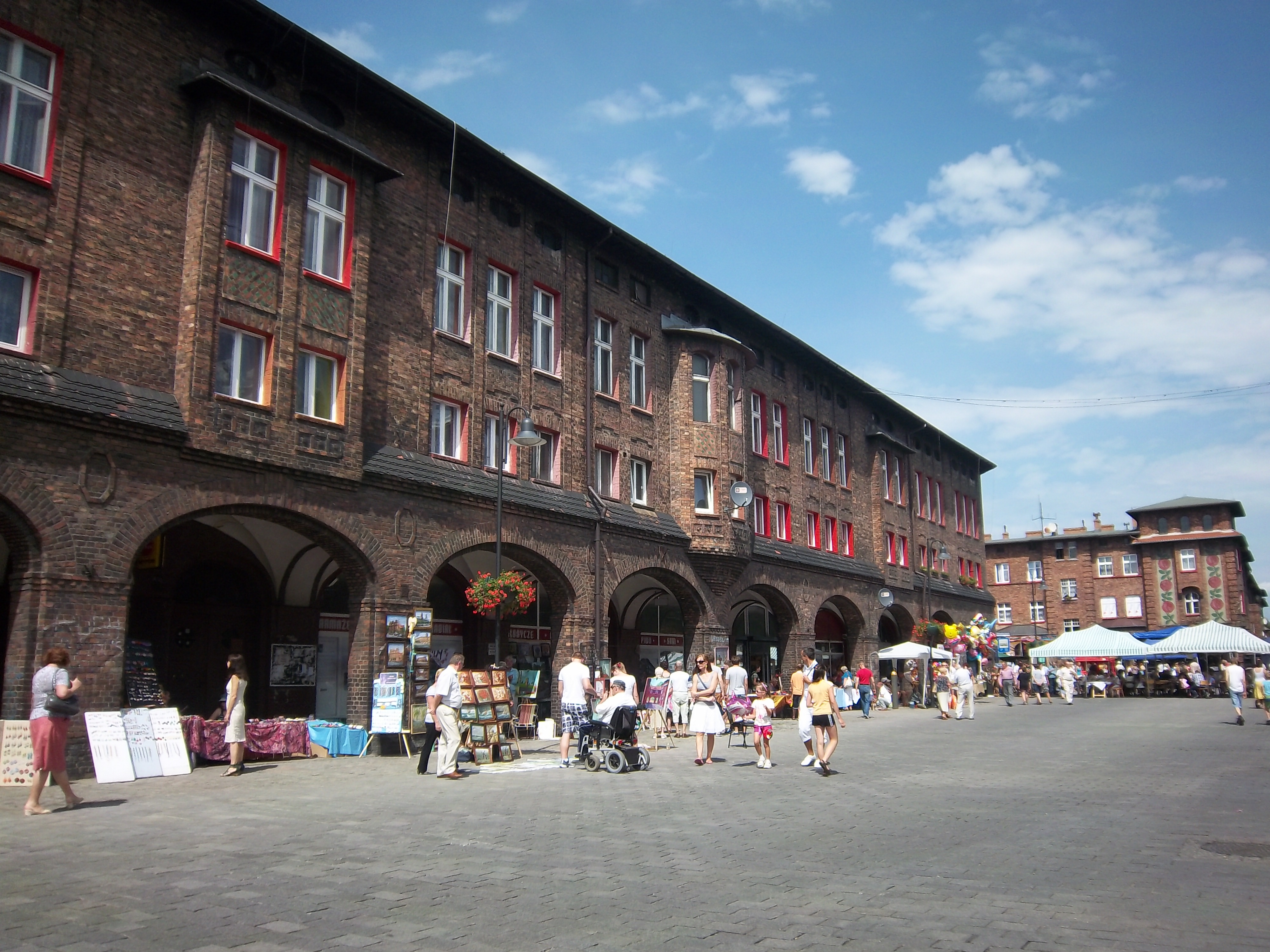 Osiedle robotnicze z lat 1908-1918, obejmujące ulice: księdza Ficka, Giszowiecka, Odrowążów, Czechowa, Janowska, świętej Anny, Garbarska, Rymarska, Nałkowskiej, Szopienicka, Plac Wyzwolenia Katowice, Nikiszowiec, Katowice 08.1978.